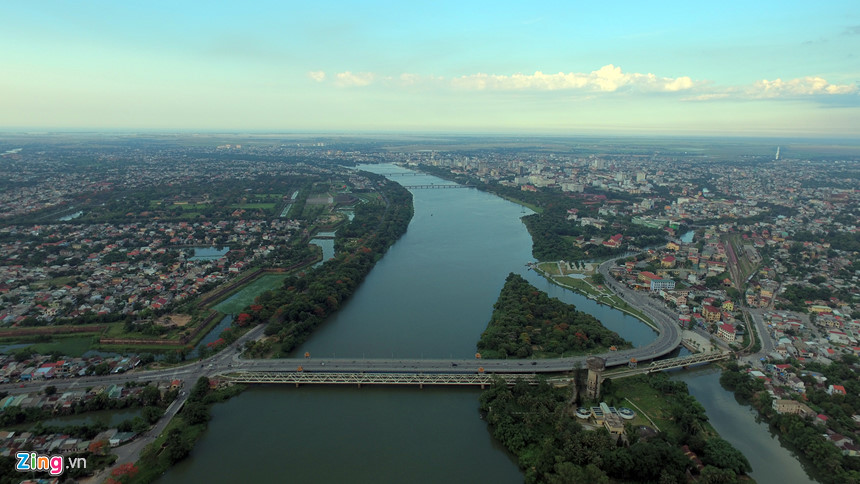 Bờ Bắc và bờ Nam của Thành phố Huế nhìn từ trên cao